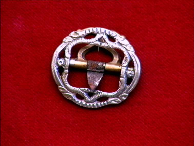 Støpt knespenne i sølv,stemplet SM for gullsmeden Michael Steen, Tønsberg, (1763-1821). Innkjøpt i Telemark. Høyde 3,7 cm. Foto Anne-Lise Reinsfelt / Norsk Folkemuseum, NF.1921-0523AB.